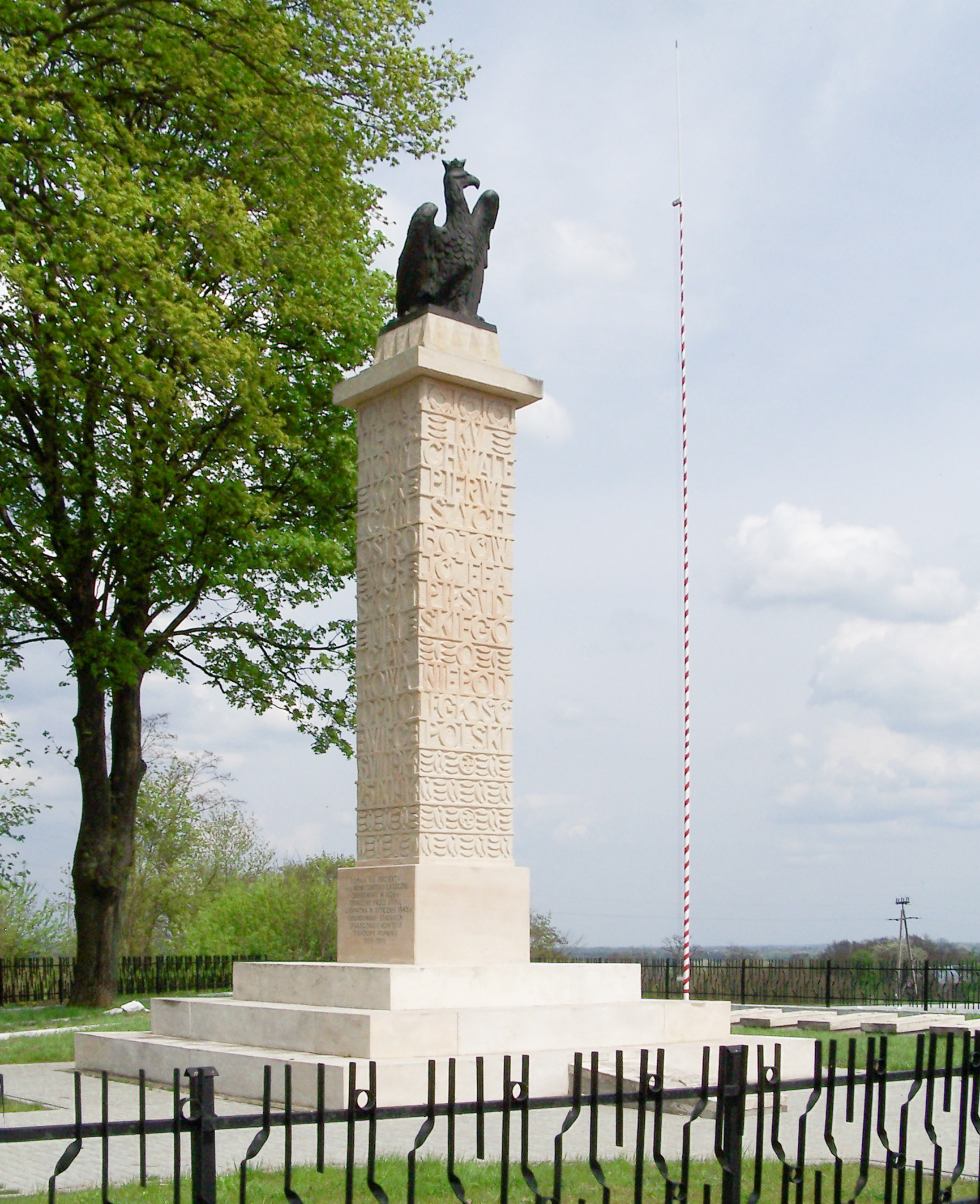 Czarkowy, cmentarz wojenny (legionowy, z 1939, AK), lata 1914-1915, 1939-1945